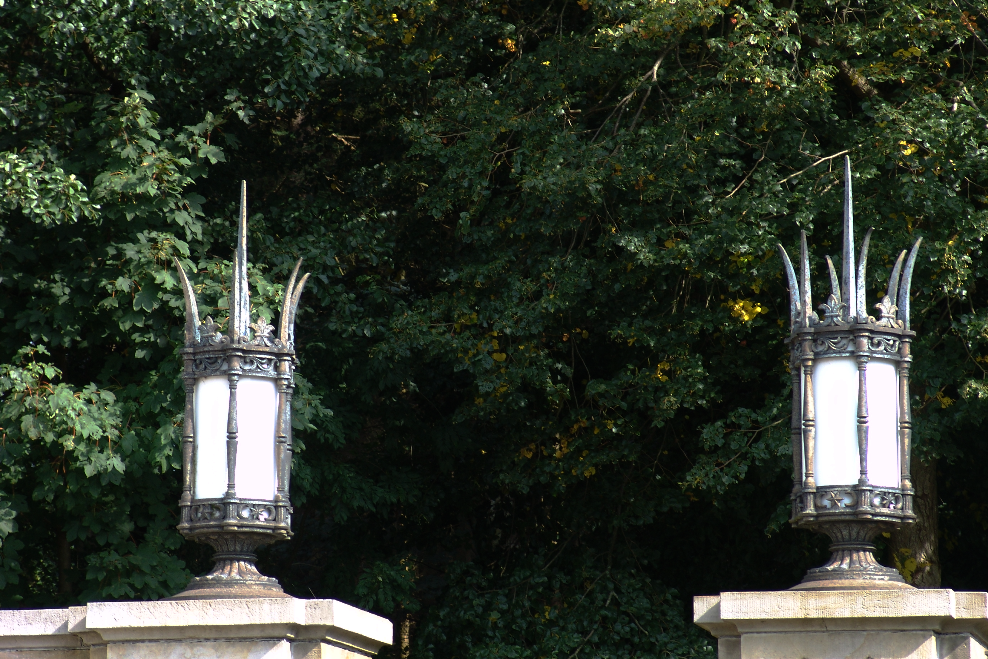 Herrenhaus Hohehorst, Schwanewede. Laternenaufsätze der Torpfeiler.